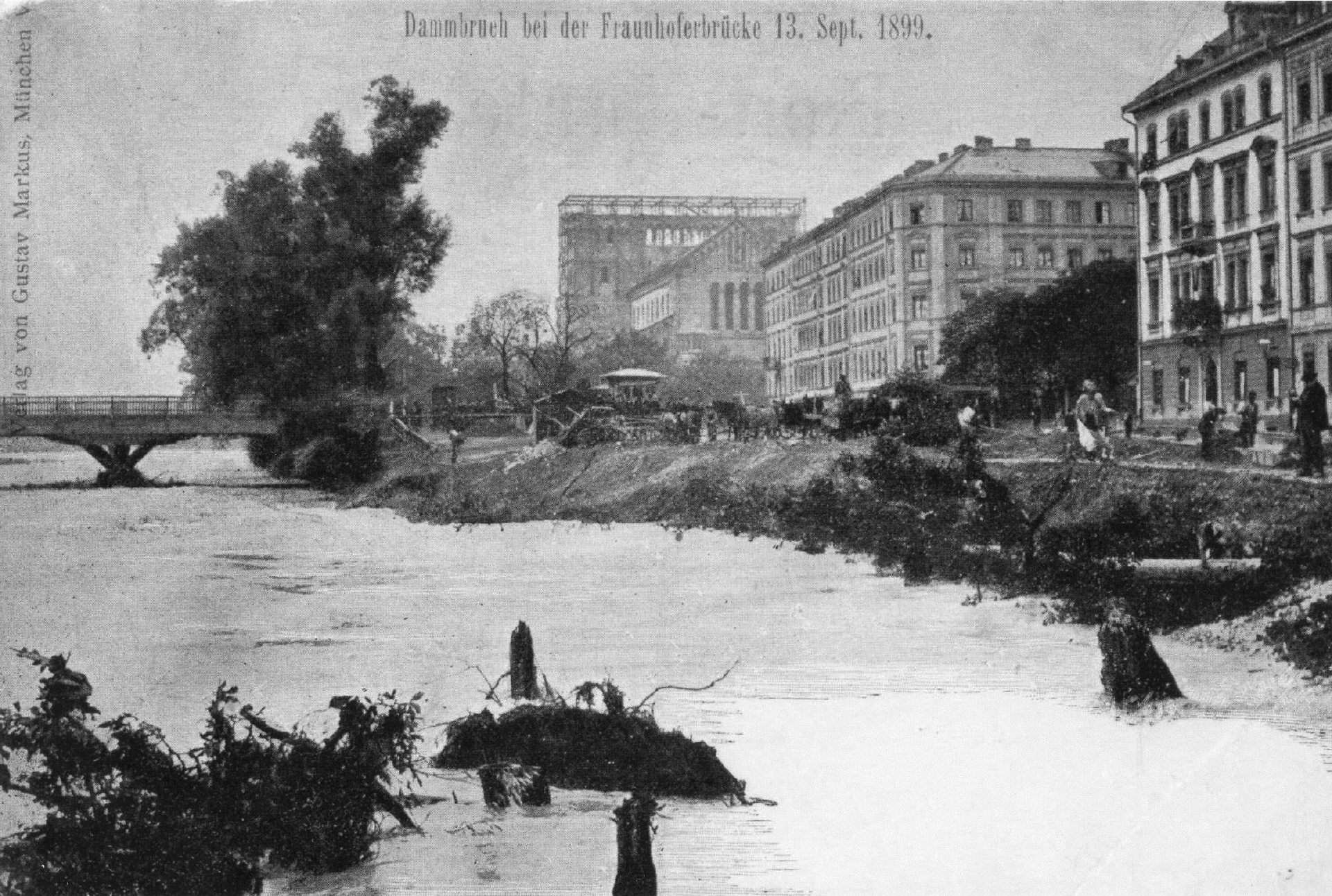 Dammbruch bei der Fraunhoferbrücke (heute: Reichenbachbrücke) in München am 13. Sept. 1899 beim Hochwasser von 1899. Ansicht des linken Isarufers von Nordosten. Im Hintergrund ist die noch in Bau befindliche Kirche St. Maximilian mit unvollständigen Türmen zu sehen. Postkarte. Verlag Gustav Markus, München.